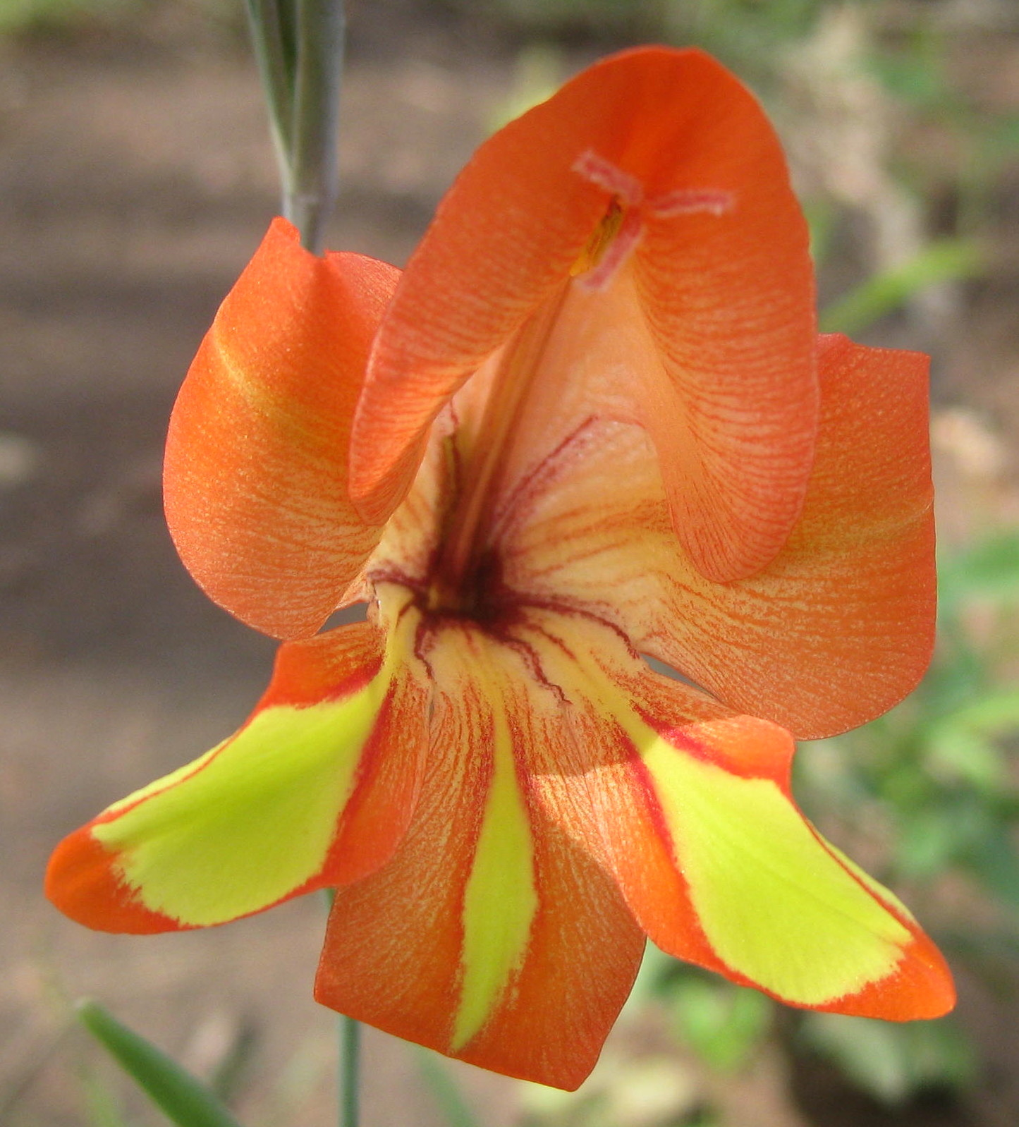 Gladiolus decorus